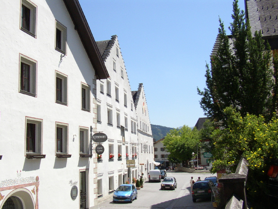 Bürgerhäuser in Mauterndorf